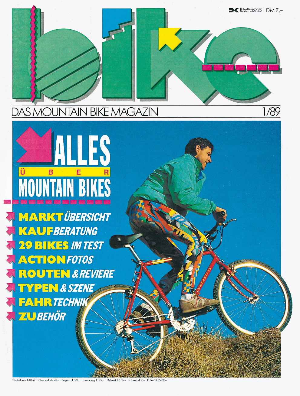 Titel/Cover der Erstausgabe des bike-Magazins